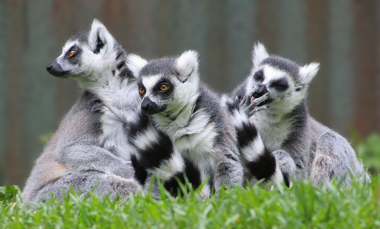 Lemur catta